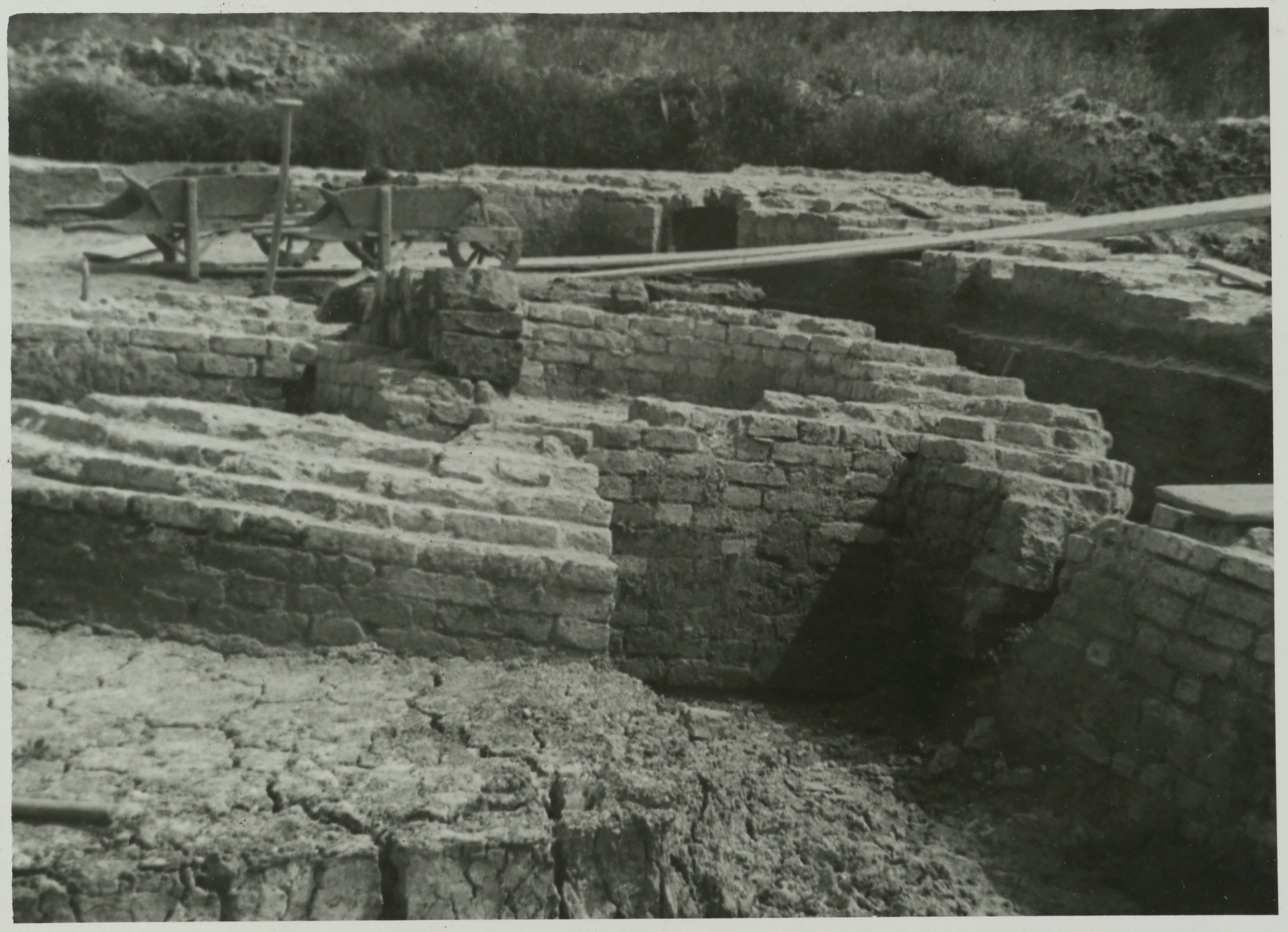 Huis te Merwede: Opgraving ruïne